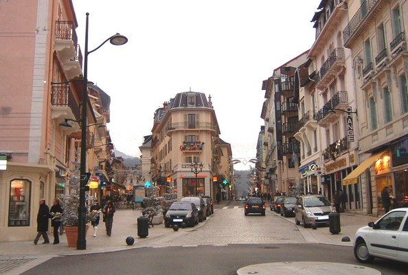 Le centre ville de la commune d'Aix-les-Bains en France dans le département de la Savoie.